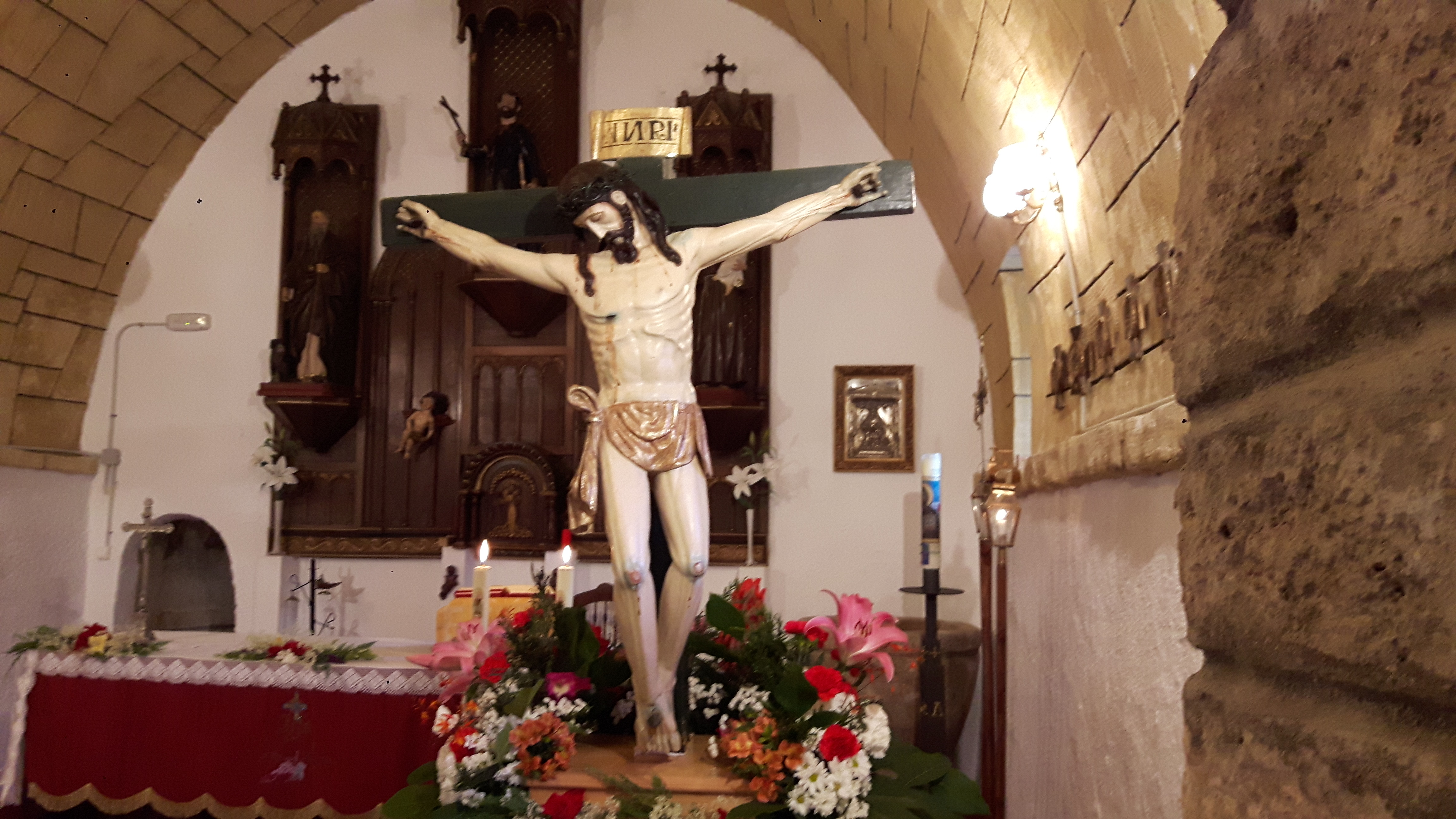 El el frente, se encuentra el santísimo Cristo de la paz; tras este, custodiando el retablo, santo Tomas, obra de Juan de Juni y en el fondo, la pared blanca donde se encuentran tapadas las pinturas románicas